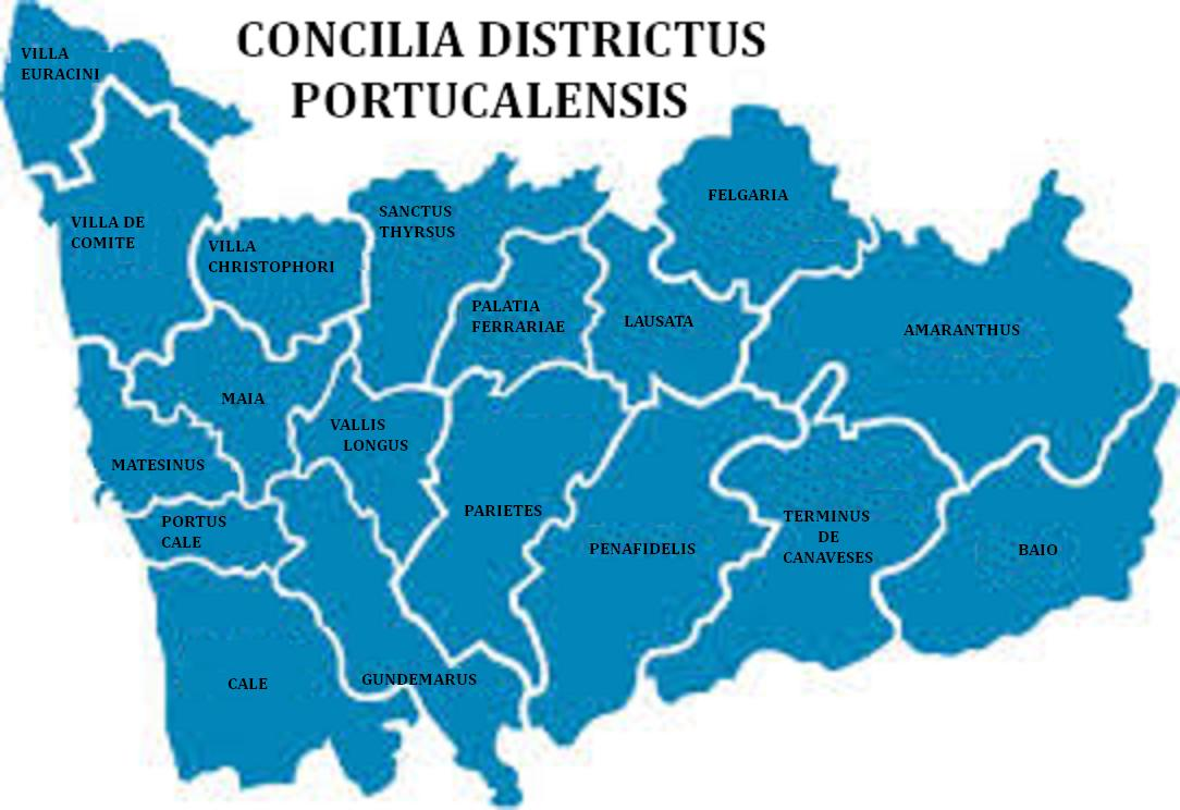 Concilia Districtus Portucalensis